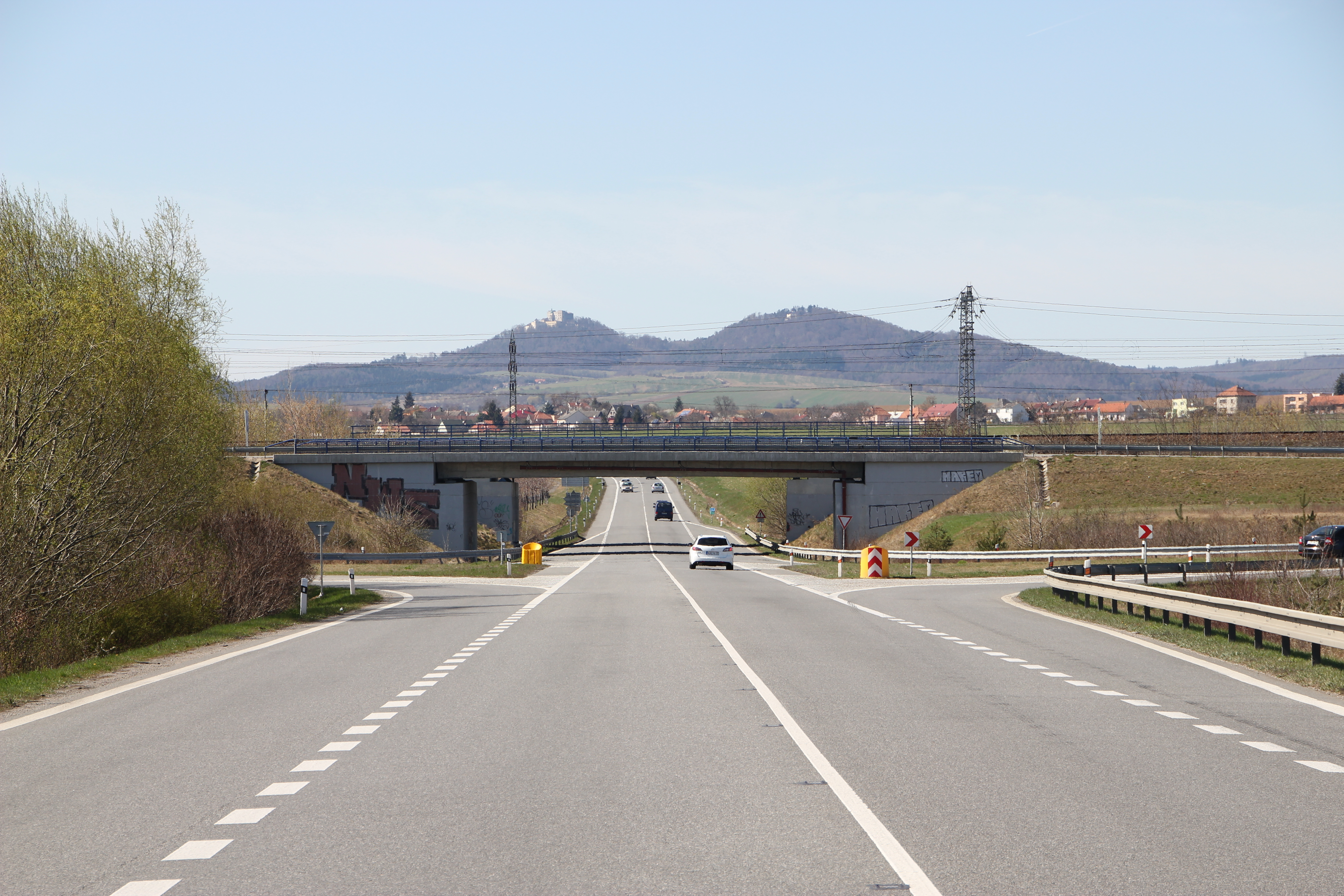 Silnice I/50 v úseku obchvat Uherského Hradiště mezi obcemi Staré Město a Kostelany nad Moravou: podjezd pod železničním mostem trati č. 330 Přerov - Břeclav a deltovitá mimoúrovňová křižovatka se silnicí II/427. V pozadí panorama Chřibů s vrchy Buchlov a Modla.